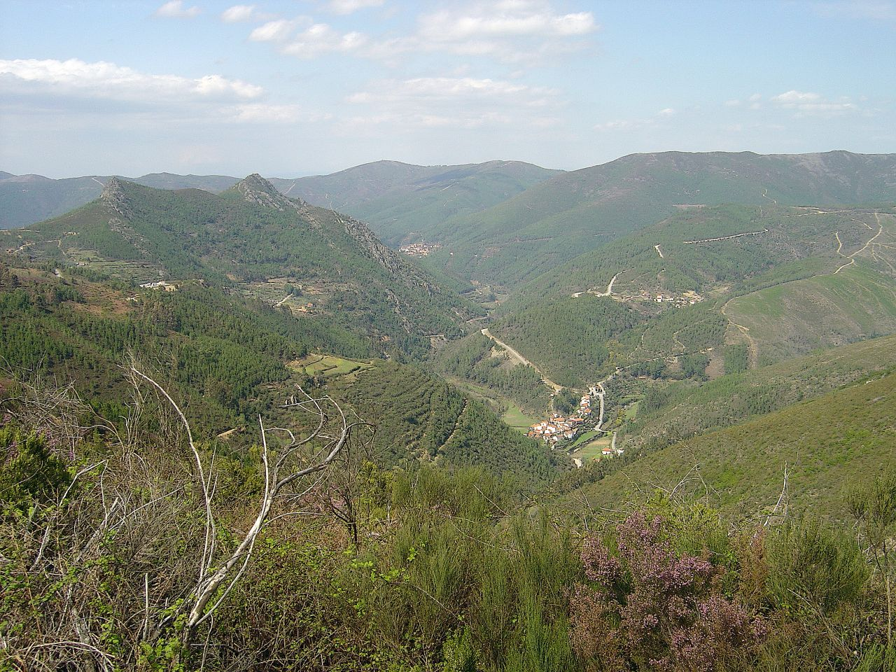 Serras da Pampilhosa da Serra - Fajão